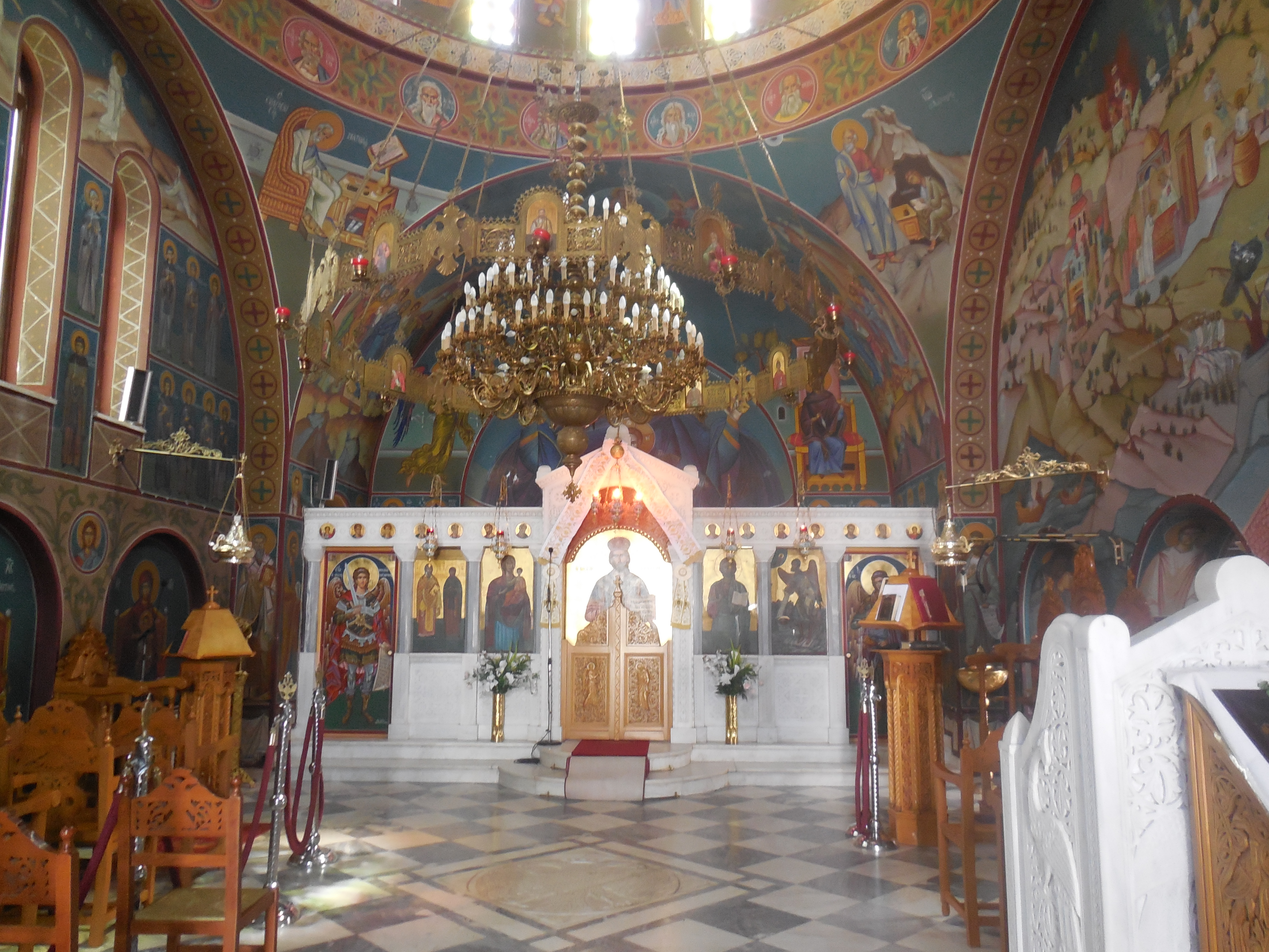 Монастырь святого Рафаила. Внутри церкви святого Рафаила